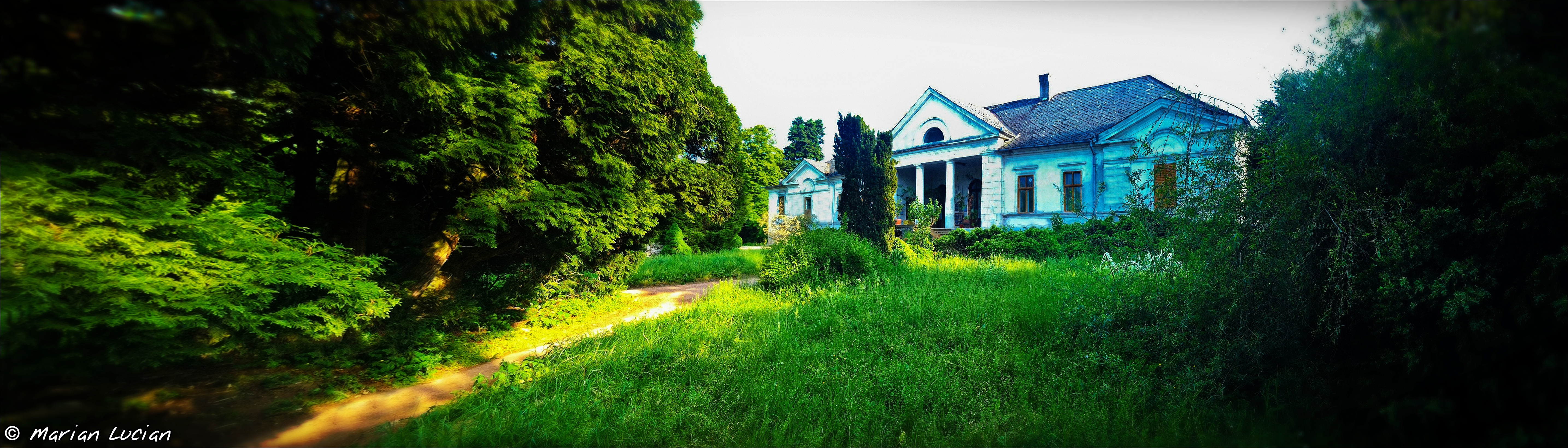 Arboretum Simeria